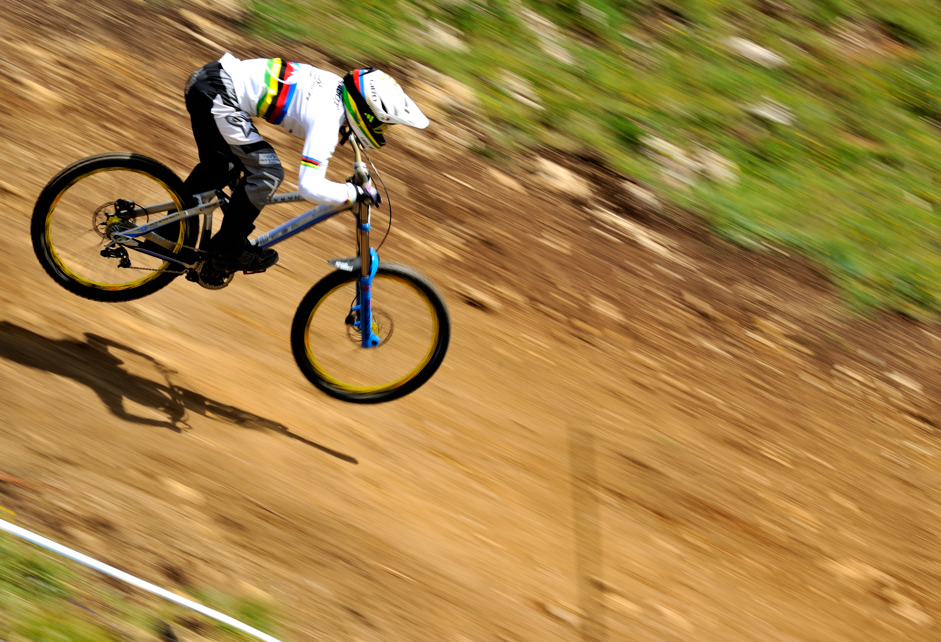 Emmeline Ragot et son Jersey arc en ciel de championne du monde